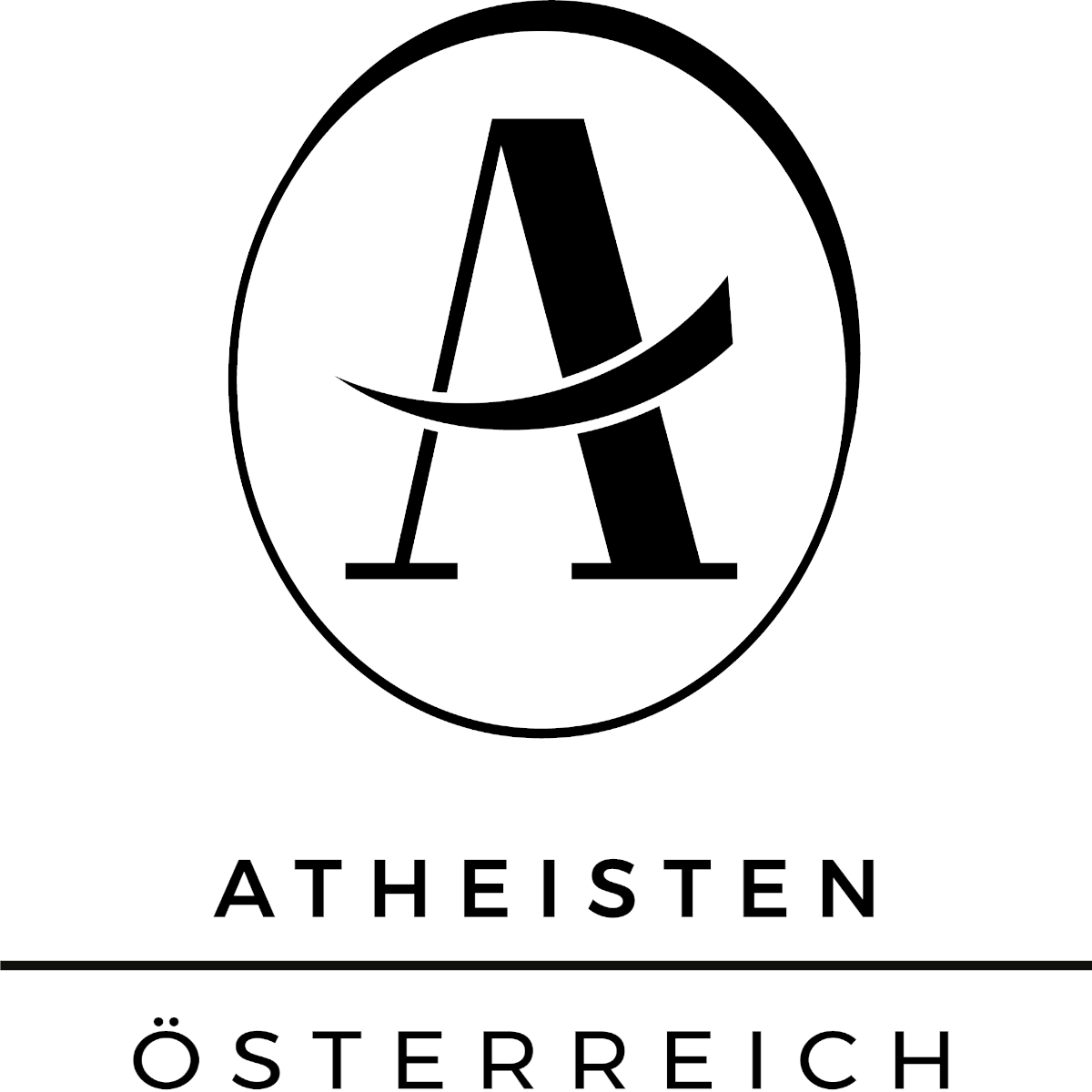 Atheisten Österreich Logo mit einem großen A das eingekreist ist.